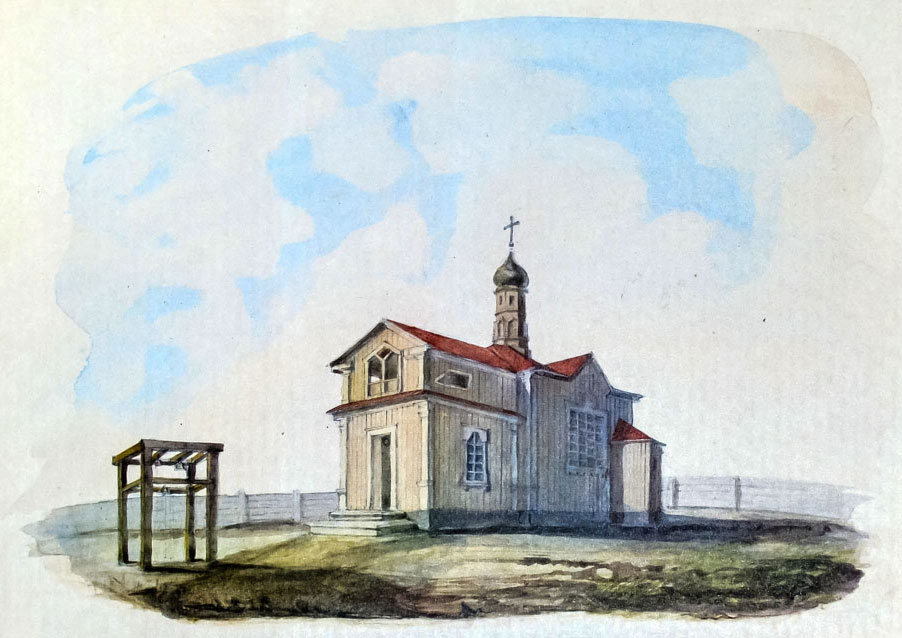 Беларуская (тарашкевіца): Круговічы (Kruhovičy). Царква Сьвятога Юрыя